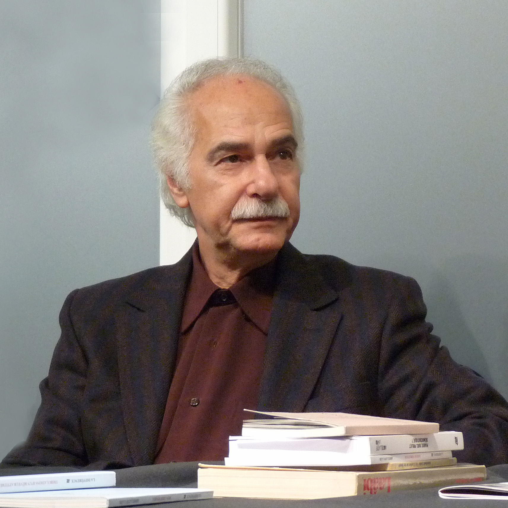 Conversation avec Abdellatif Laâbi dans une librairie strasbourgeoise (France)